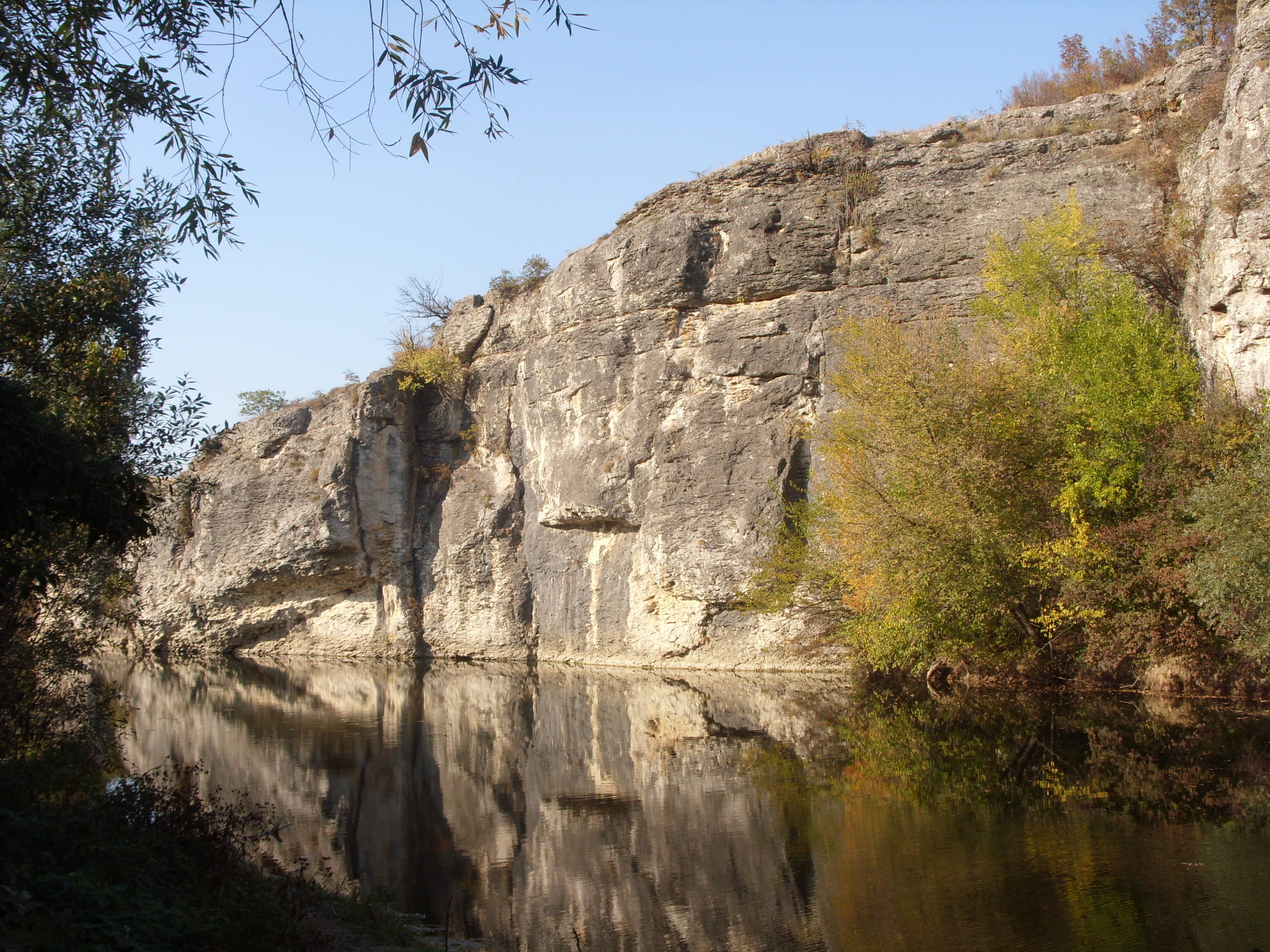 Деветашко плато-река Осъм,местноста водопада.